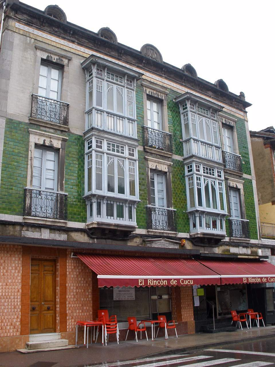 Ujo, Mieres (Asturias)